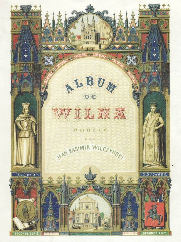 Jan Kazimierz Wilczyński, „Album Wileńskie”